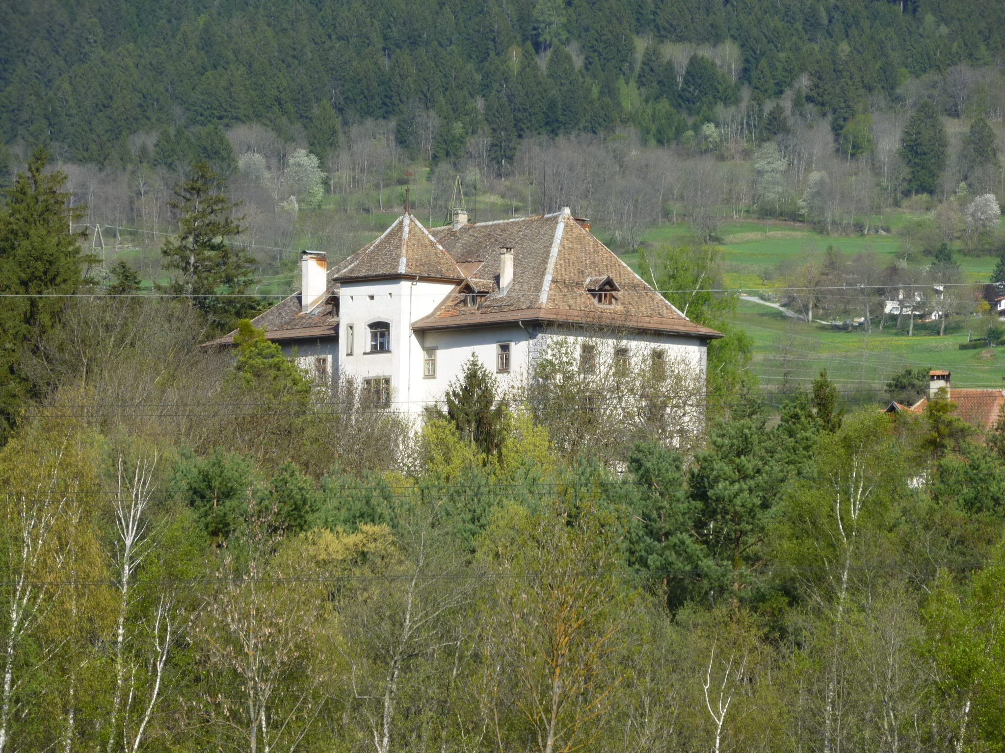 Bischöfliches Schloss Schauenstein Ansicht von Westen